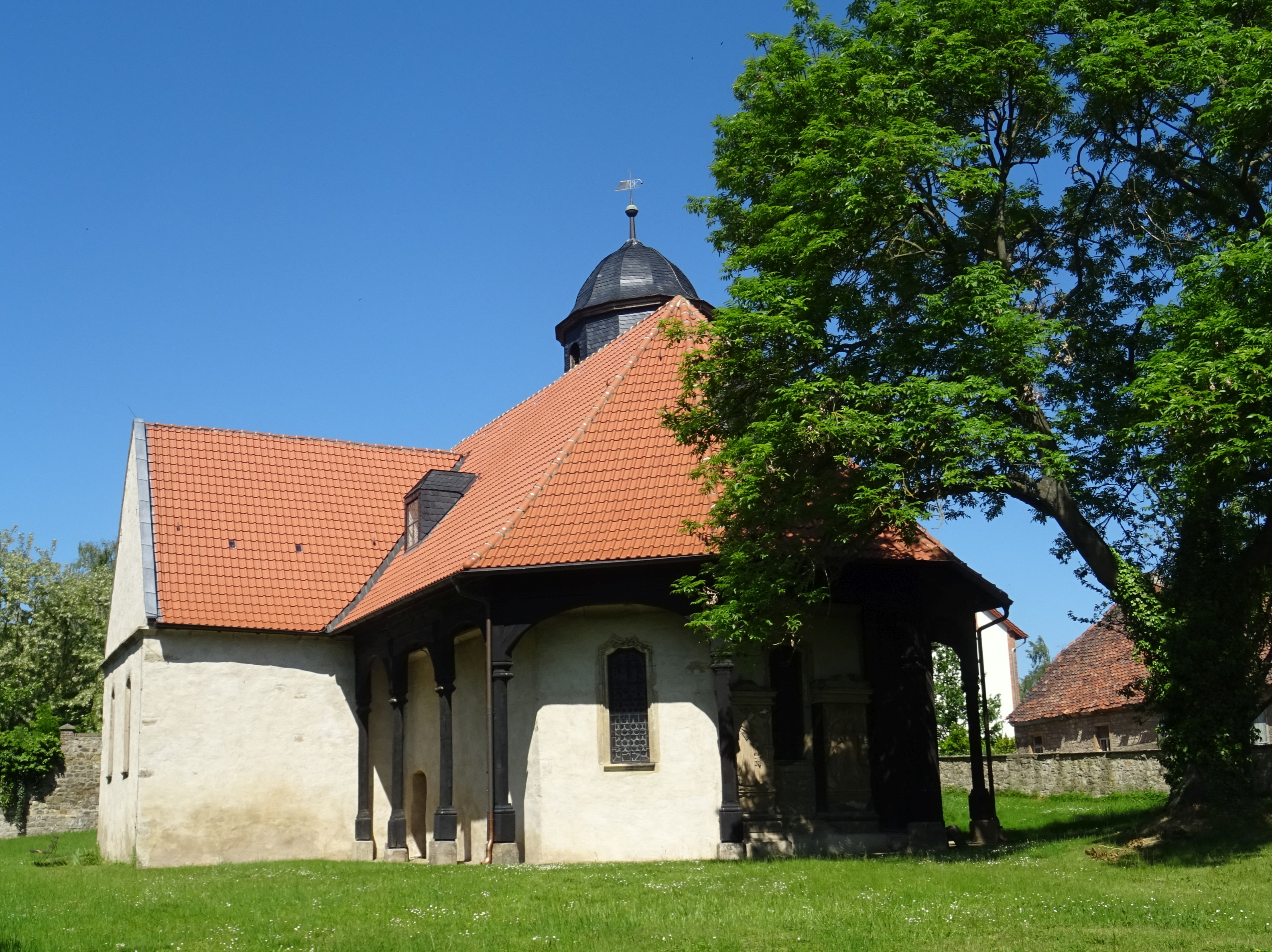 Ampfurth, denkmalgeschützte Kirche